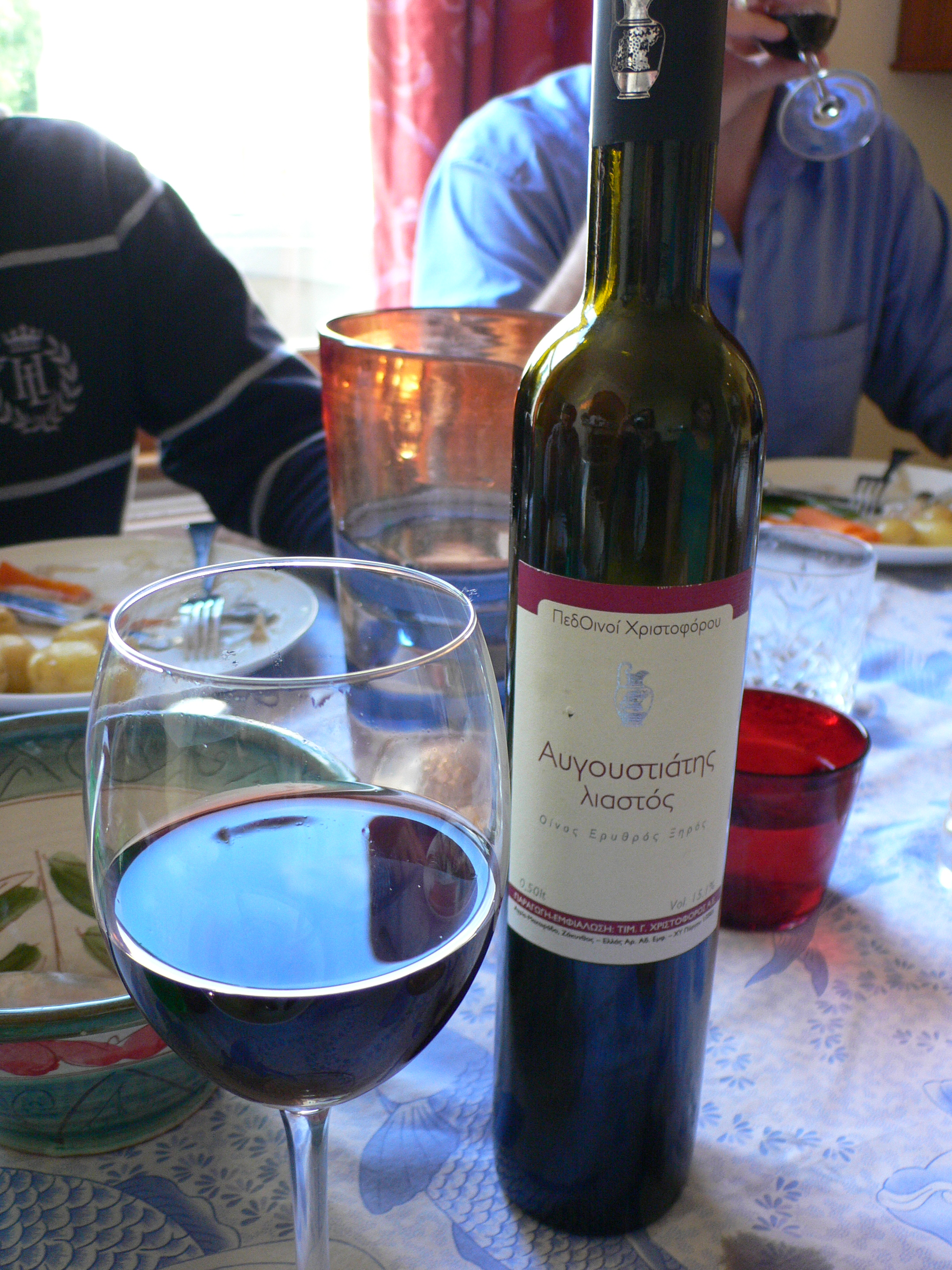 Vin rouge de Zakynthos